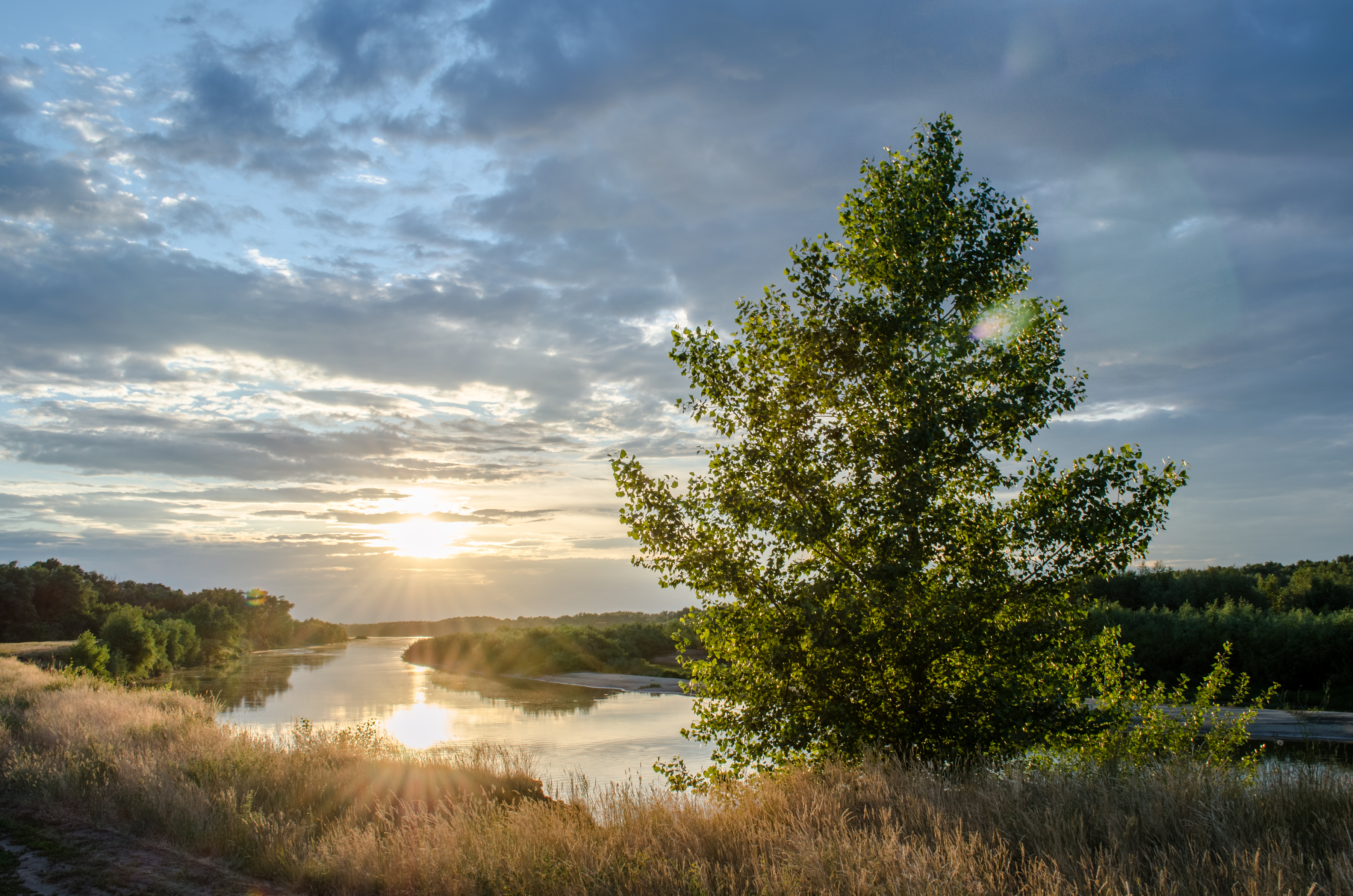 Водоохранная зона Дона (Клетский район), Клетский район This image is related to the protected area of Russia number 3410202